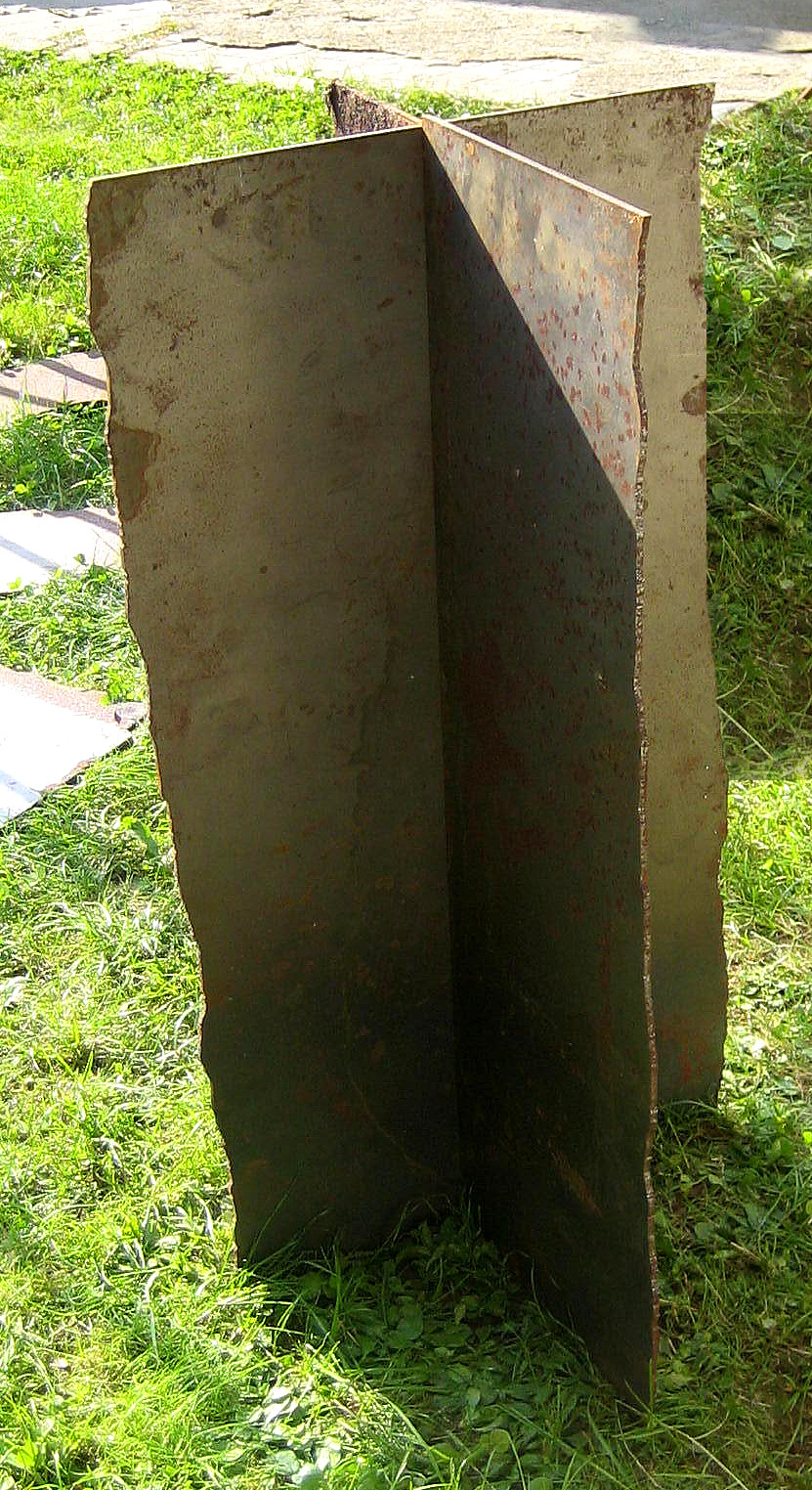 Gerhard Raab (* 1956): Crossing the view 1, Stahl, 100/60/50cm, 2009.